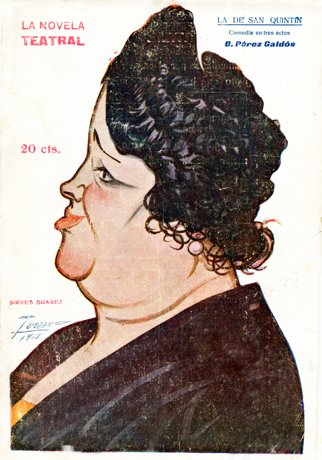 Caricatura de Nieves Suárez.